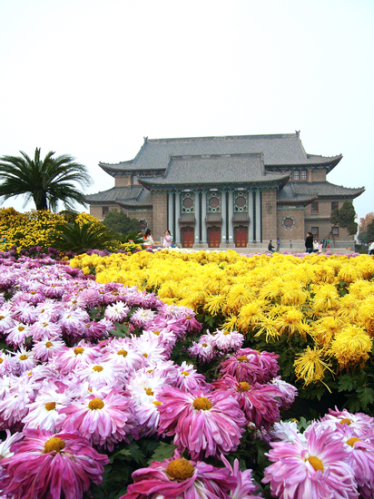 菊花与河南大学大礼堂